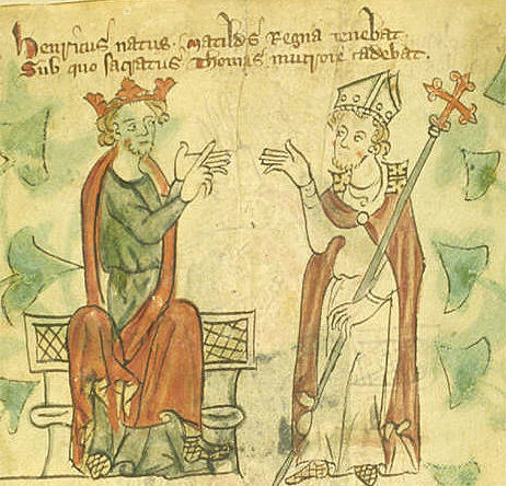 Jindřich II. a Tomáš Becket